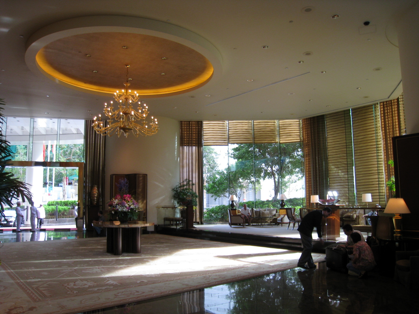 Conrad Hong Kong Lobby